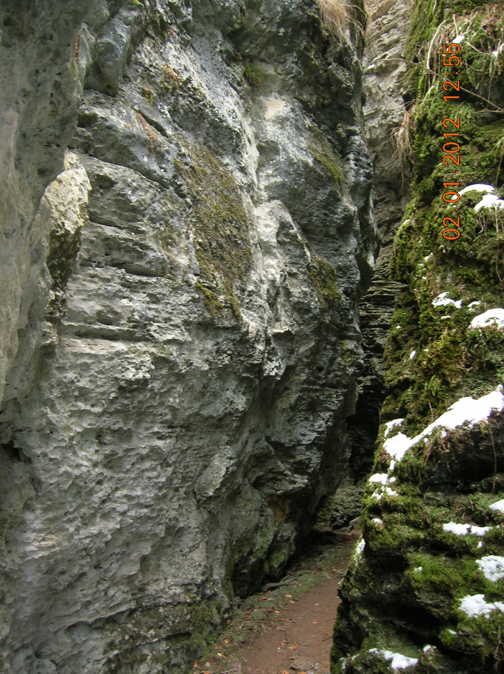 Jud. Harghita, Oraş Borsec, Rezervaţia Scaunul Rotund, Grota Urşilor